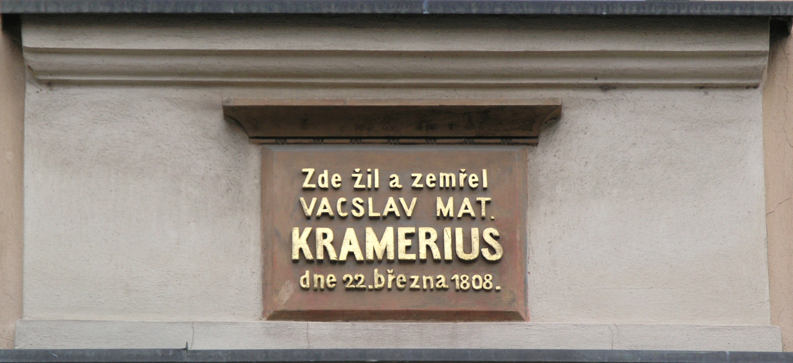 Praha, Staré Město - ulice Husova